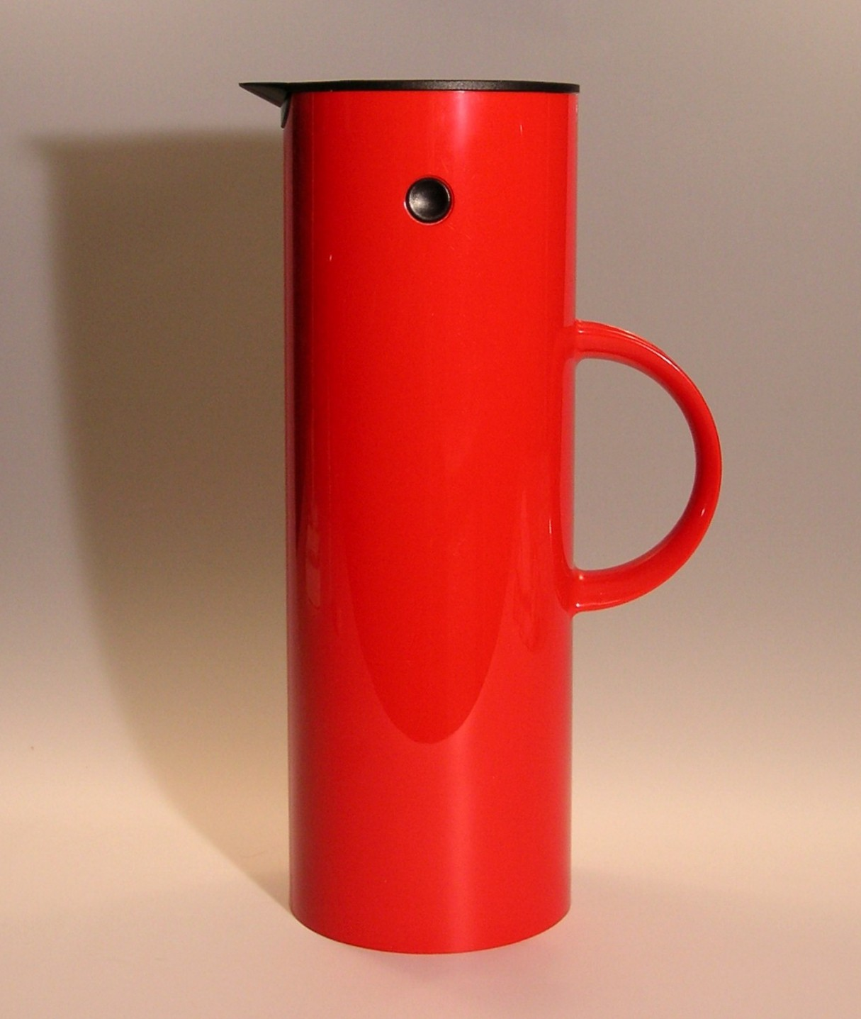 Steltons termoskanna (Thermoskanne), designed by Erik Magnussen